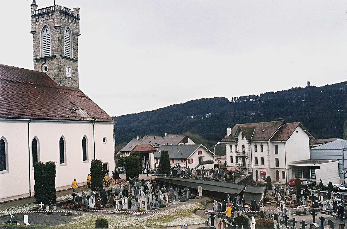 Flèche de l’église Notre-Dame de l’Assomption d’Attalens, arrachée par la tempête Lothar pendant la messe du 26 décembre 1999